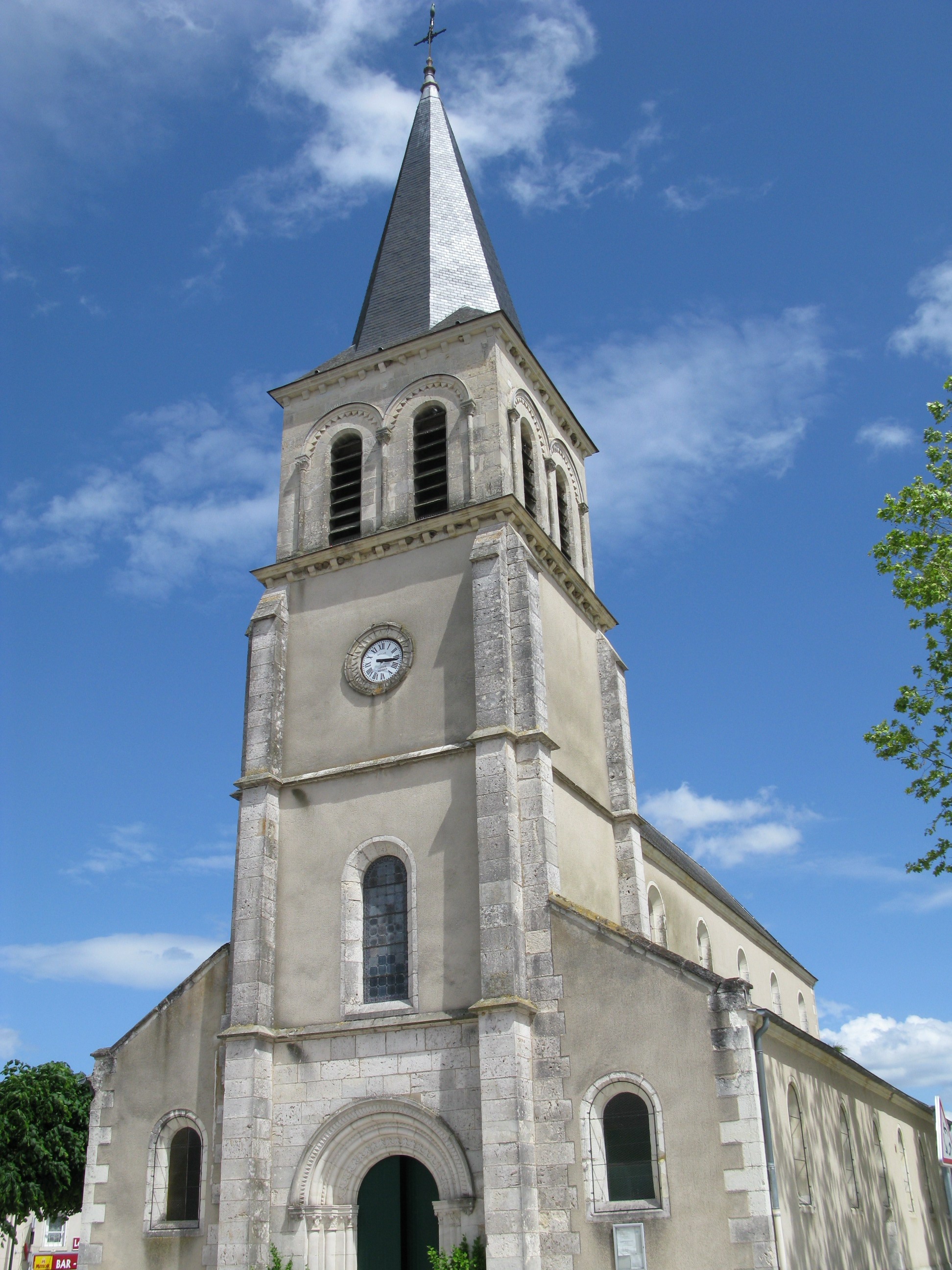 L'église de Marmagne